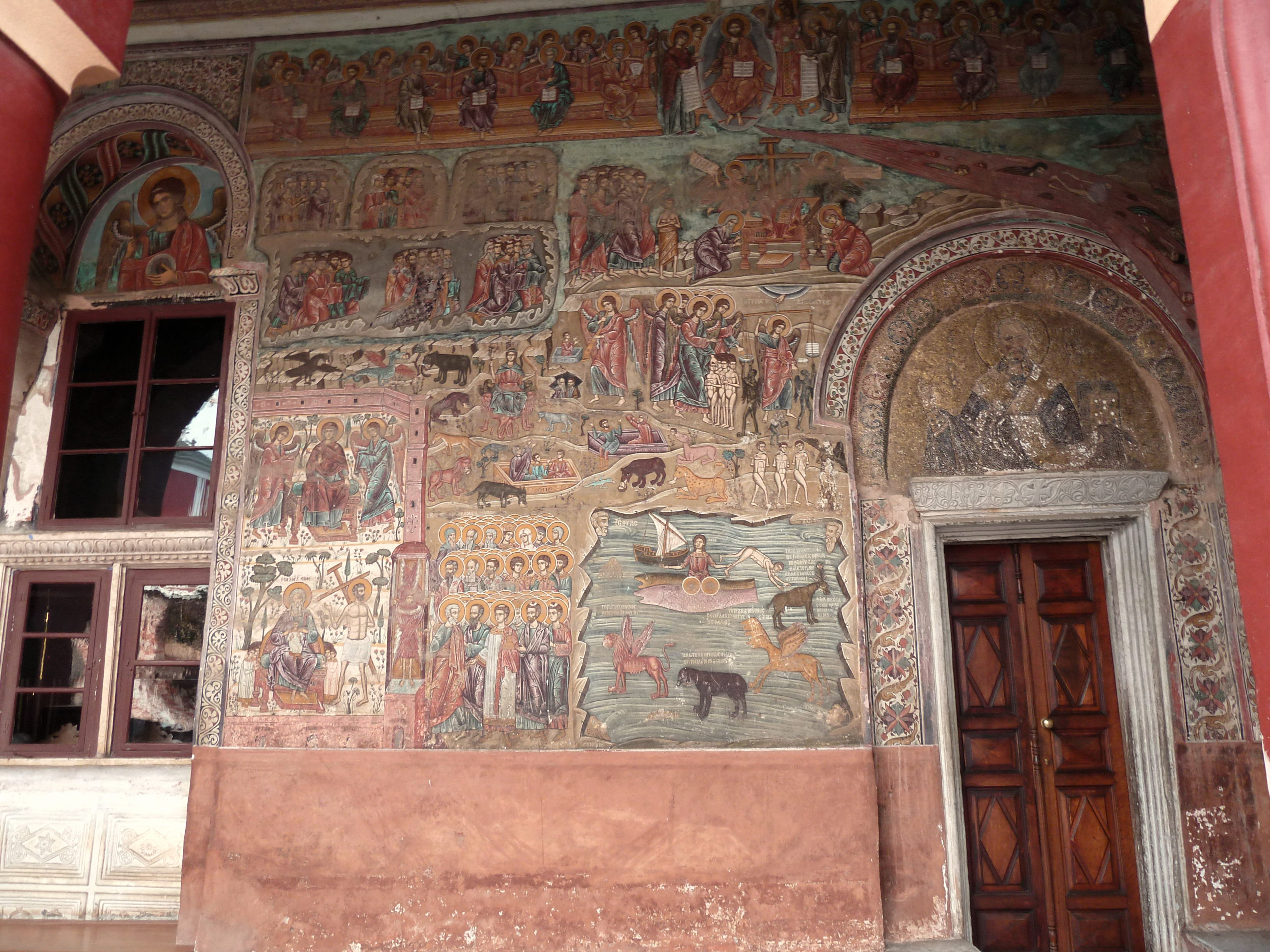 Fresque du jugement dernier sur la façade du katholikon du monastère de Vatopedi (Mont Athos)